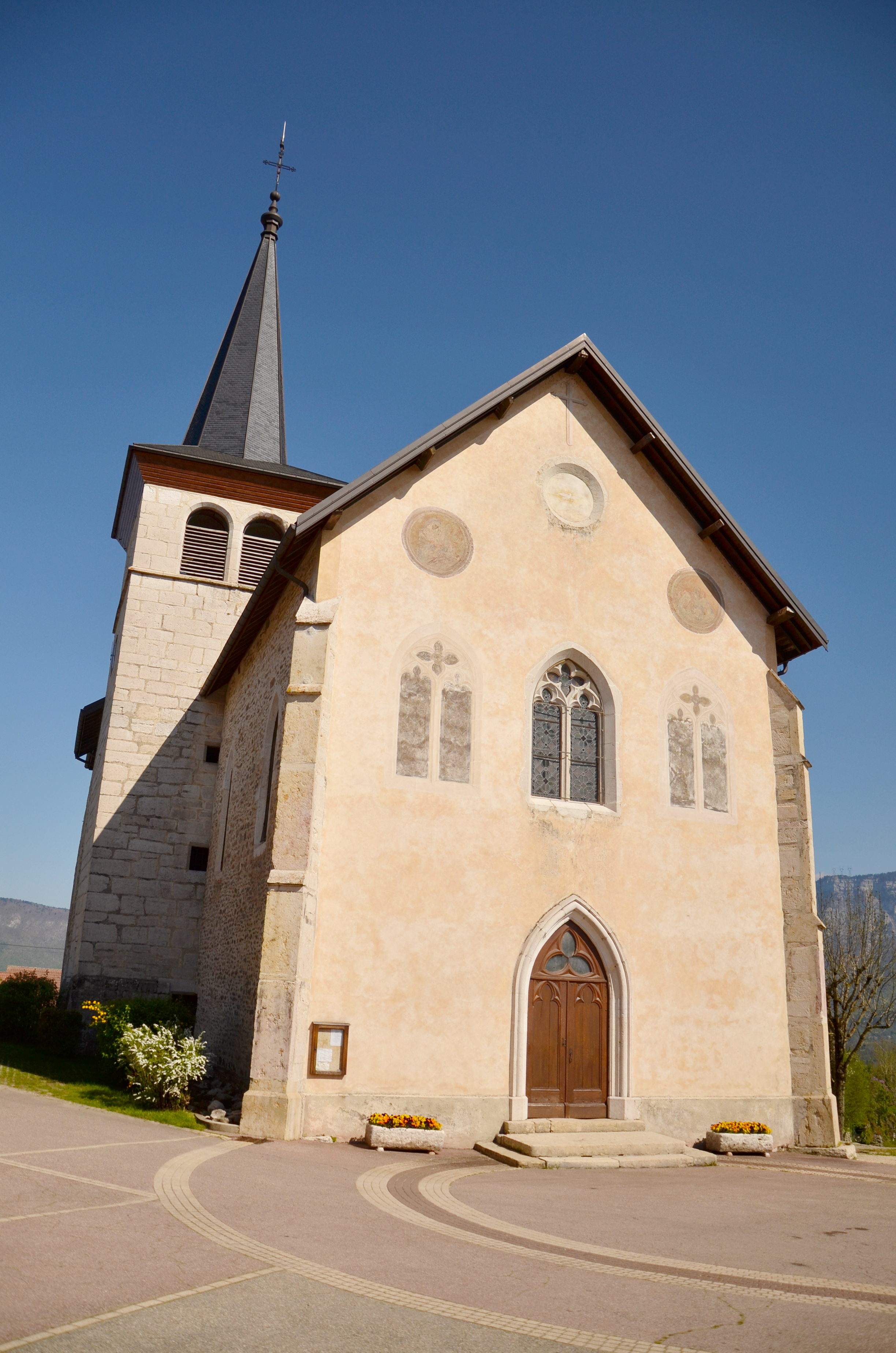 Eglise et place de Dullin centre